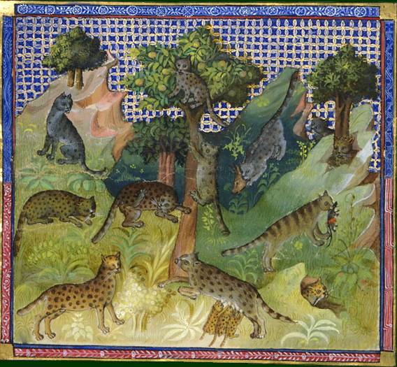 Illustration de la section "les chats" du Livre de Chasse de Gaston Phoebus (1331-1391). "Il y a diverses espèces de chats sauvages : spécialement il y en a qui sont grands comme des léopards, et on les appelle tantôt loups-cerviers, tantôt chats-loups ; et c'est mal dit, car ils ne sont ni loups-cerviers ni chats-loups. Il vaudrait mieux les appeler chats-léopards qu'autrement, car ils ont plus de traits communs avec le léopard qu'avec aucune autre bête. Ils vivent de ce dont les autres chats vivent, sauf qu'ils prennent des poules et des oies et une chèvre ou une brebis, s'ils la trouvent toute seule, car ils sont aussi grands qu'un loup et ont aussi la forme d'un léopard, sauf qu'ils n'ont pas si longue queue ; un lévrier tout seul ne se pourrait prendre à l'un de ces chats et le retenir ; il prendrait plutôt un loup qu'un chat, car ils ont les ongles comme un léopard et, en outre, très mauvaise morsure. On les chasse peu si ce n'est par hasard."